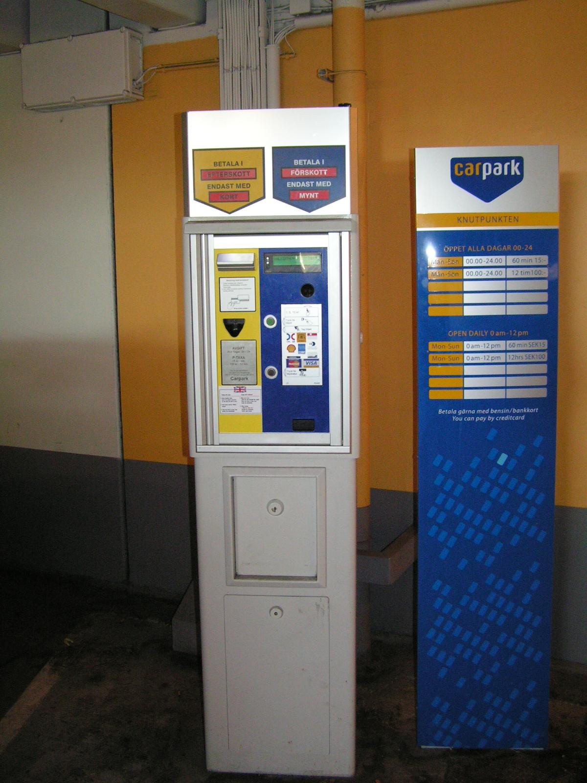 Parkingmeter